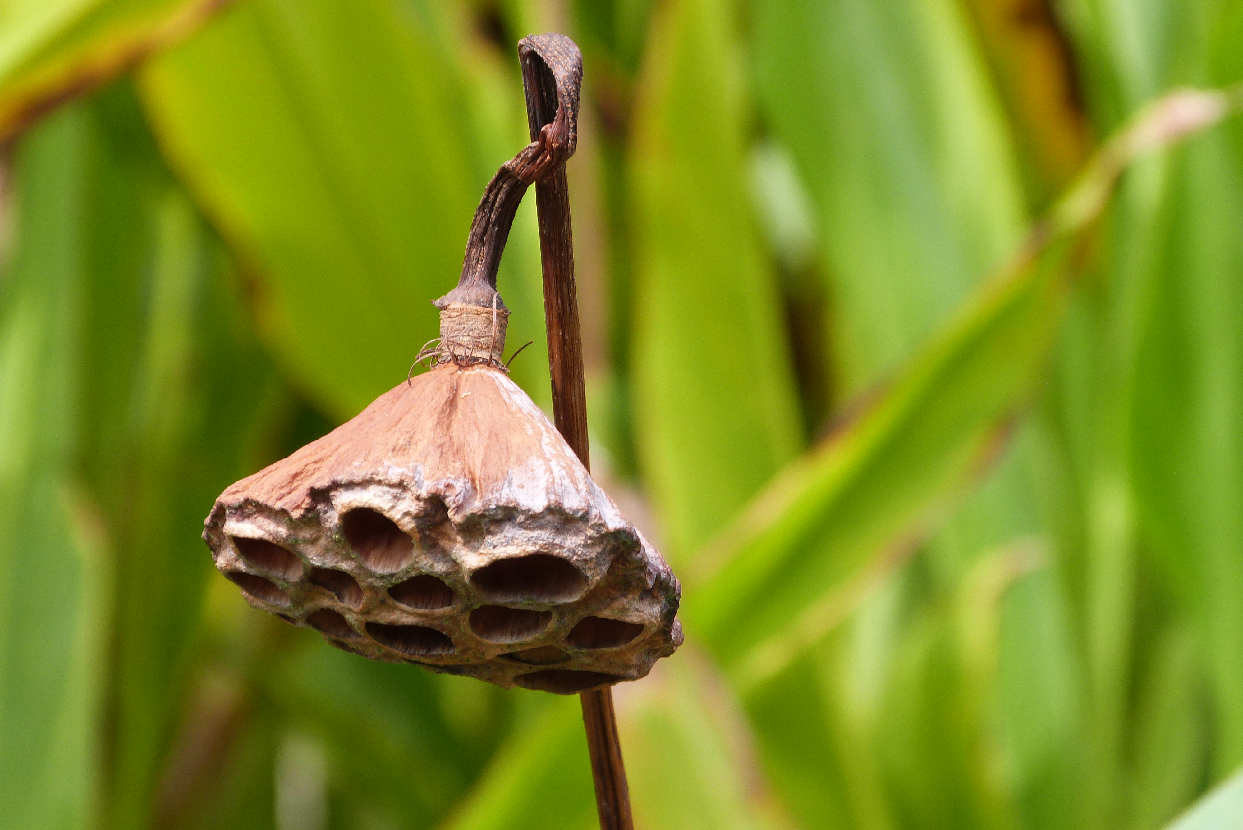 Foto tirada em Nova Odessa - SP (Instituto Plantarum)